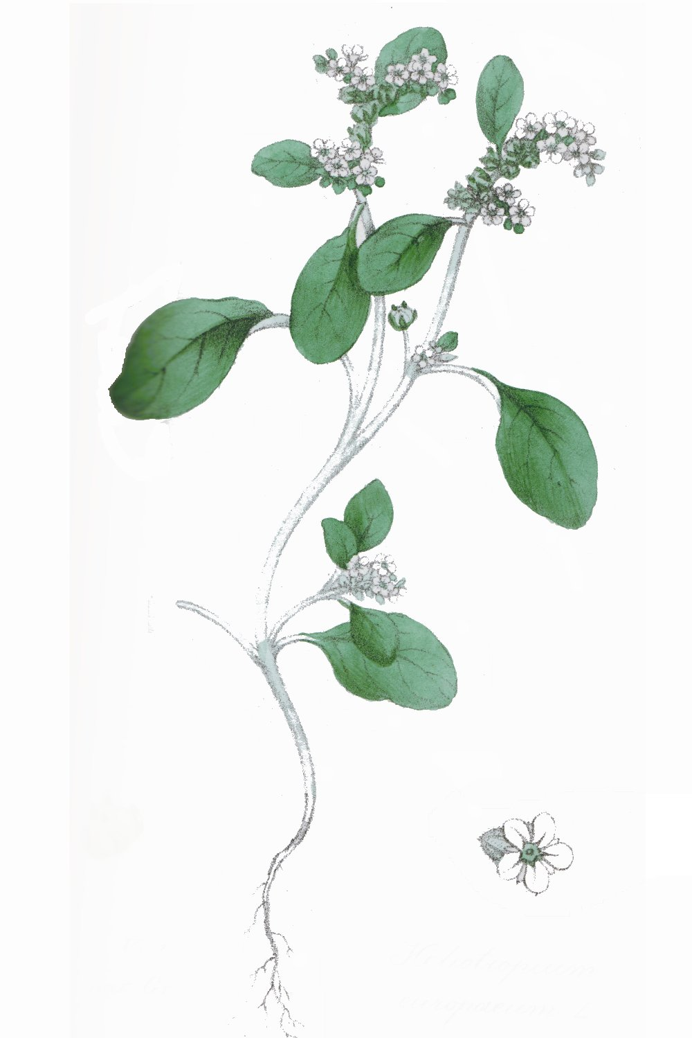 Dictionaire des plantes suisses 1853 Scanné par Utilisateur:Greatpatton